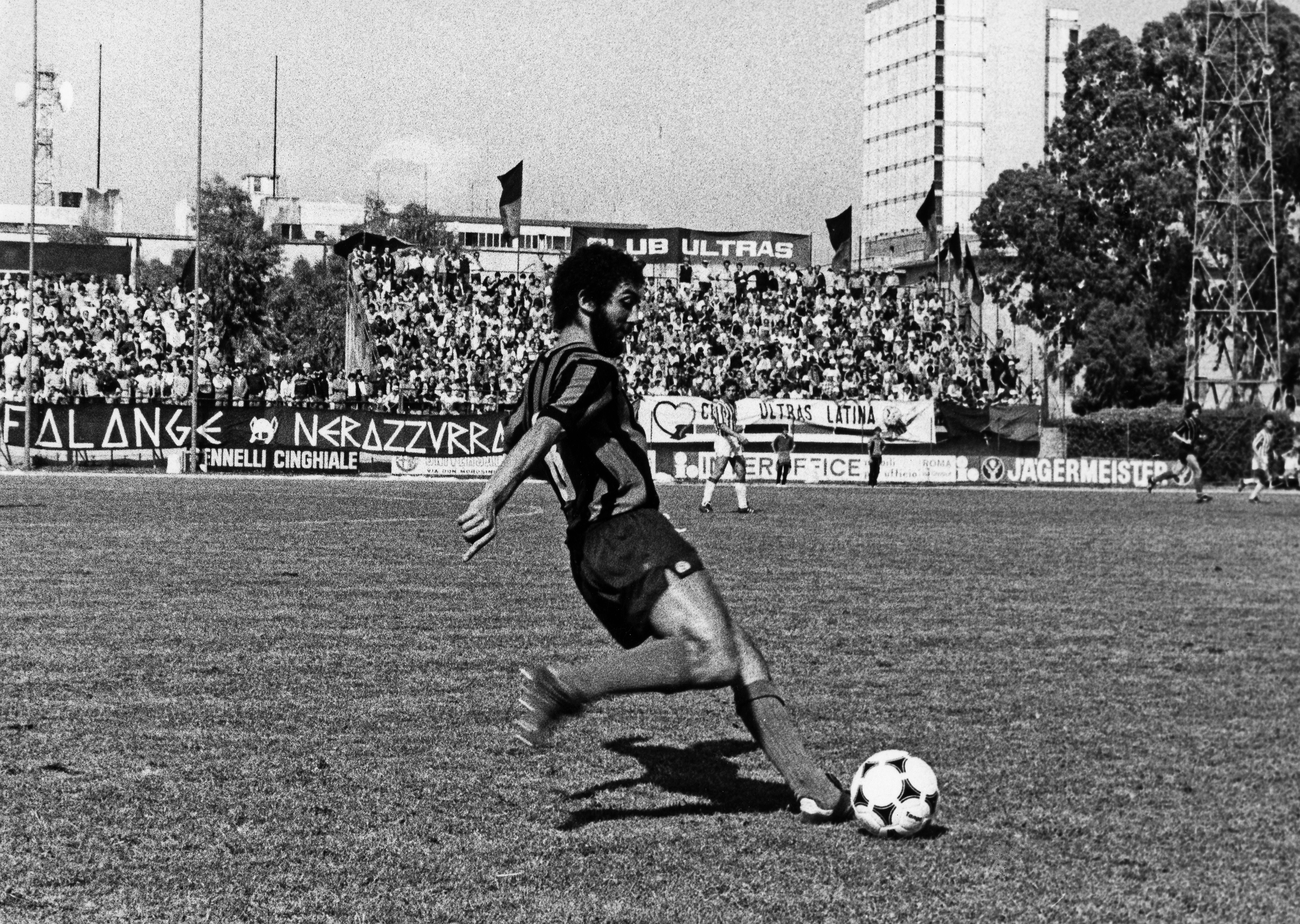 Damiano Coletta in campo nel giorno della vittoria sul Rondinella che sancisce la promozione matematica del Latina in serie C1.